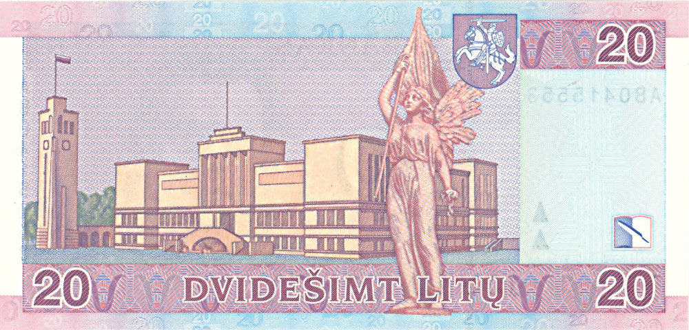 Lithuania 20 litu 2007